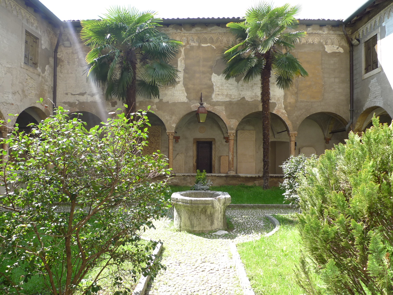 Kreuzgang des ehem. Klosters des Hl. Hieromymus - heute: Archäologisches Museum im Römischen Theater in Verona